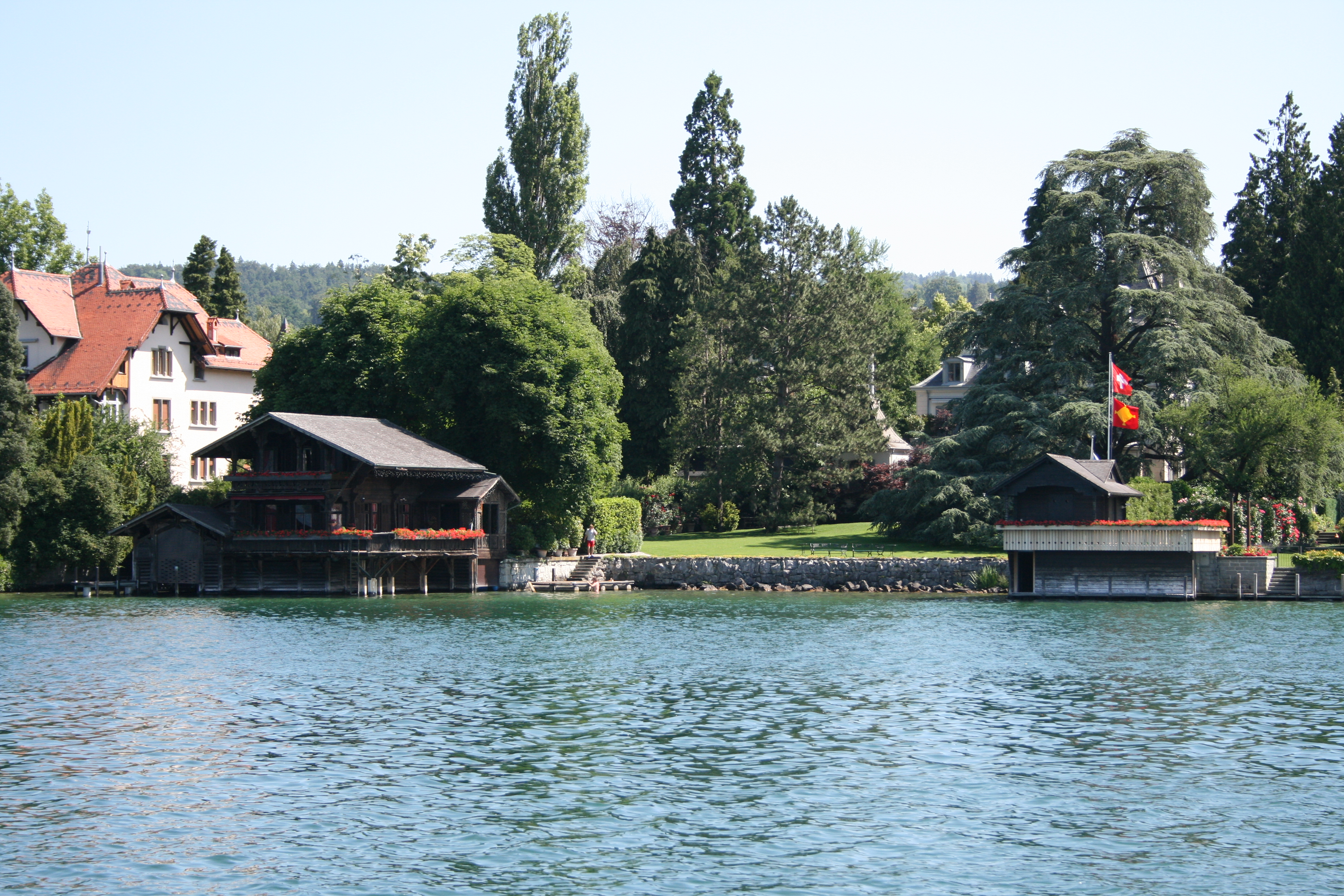 Schweiz, Küsnacht: Sicht vom Zürichsee auf das gemietete Anwesen von Tina Turner (Anna Mae Bullock) und ihrem Ehemann, Erwin Bach. Im Hintergrund eines der Gebäude, das "Château Algonquin".